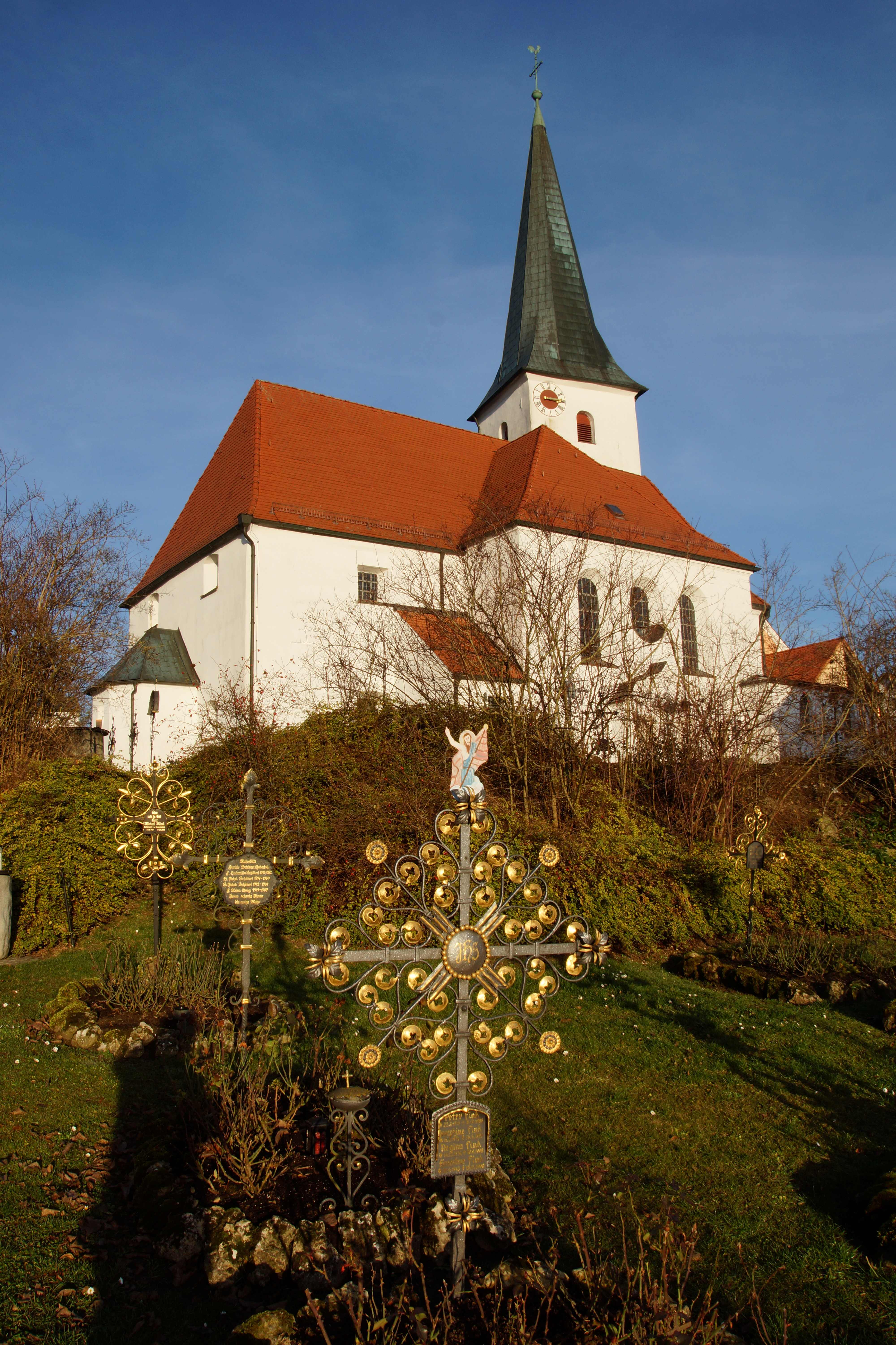 Die katholische Pfarrkirche St. Stephan im Oberpfälzischen Dietkirchen